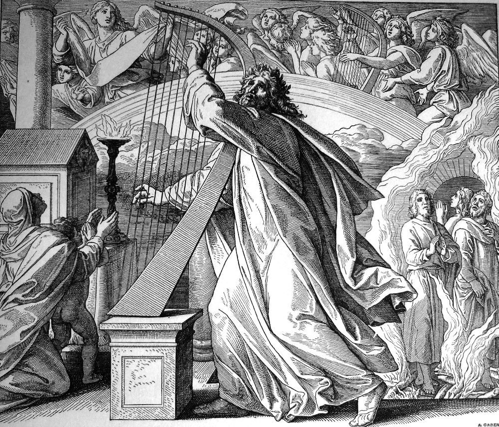 Psalmist David by Gustave Doré